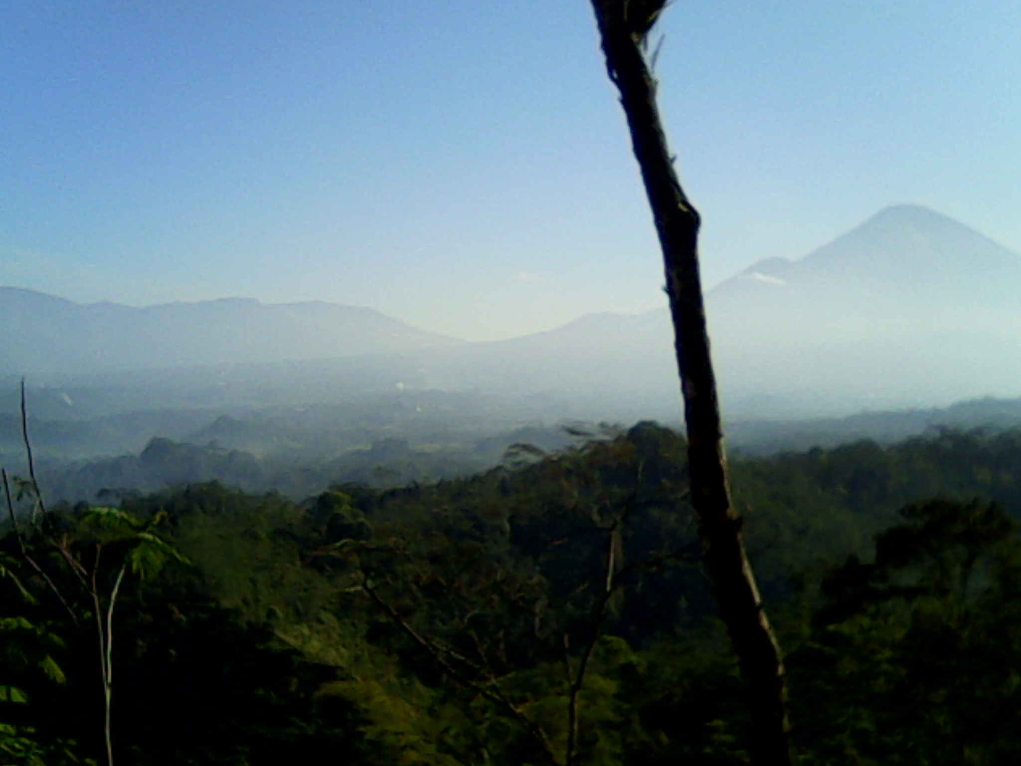 dari perbukitan desa mangunrejo